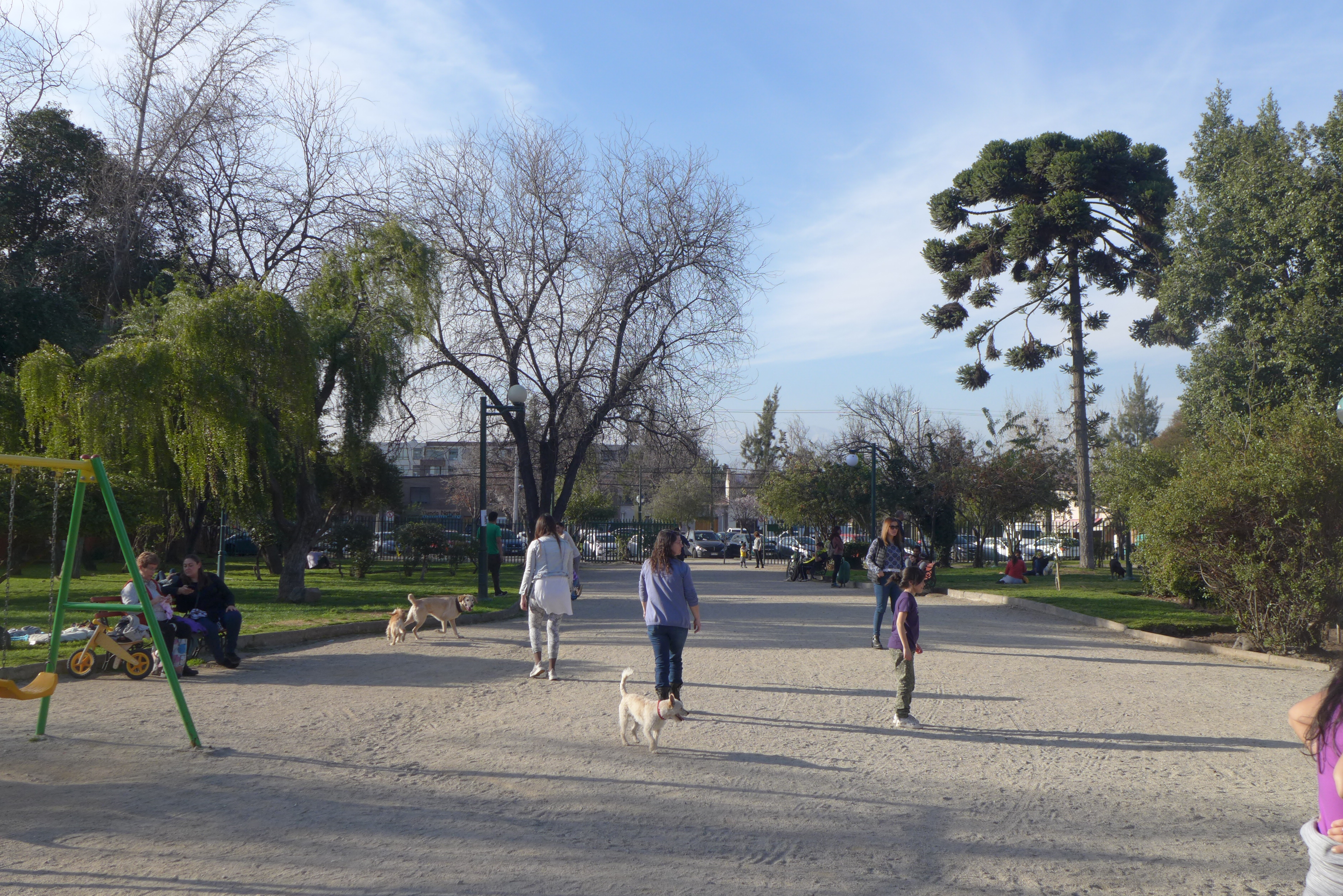 Parque Botánico Pucará en Ñuñoa, Santiago de Chile